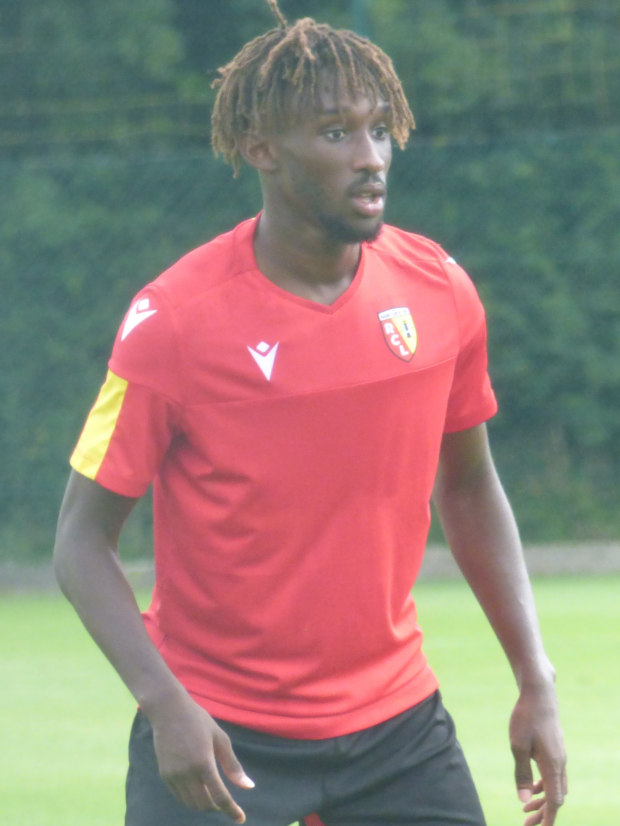 Charles Boli lors de l'entraînement public du Racing Club de Lens, au centre technique et sportif de La Gaillette le 2 juillet 2019.